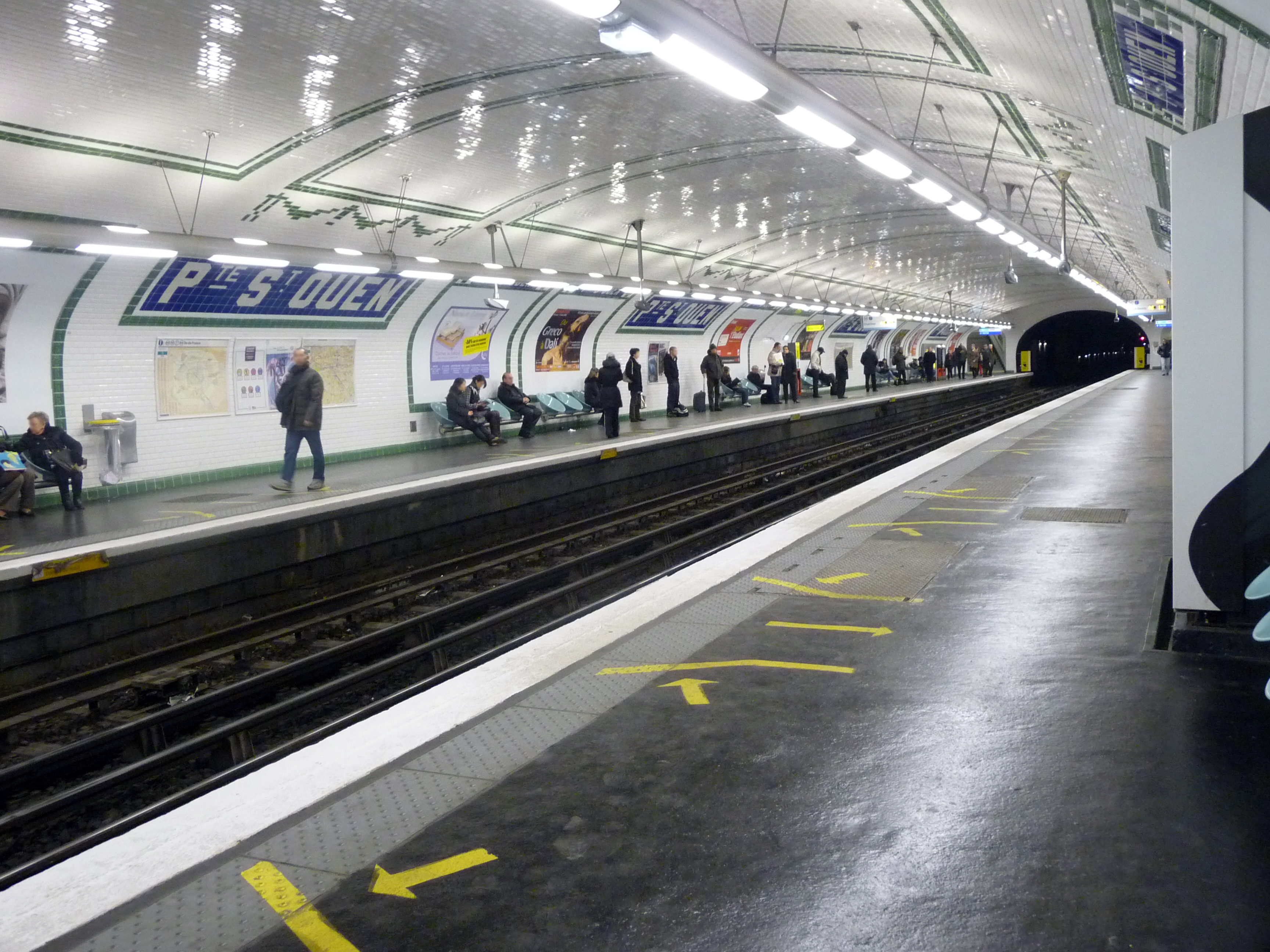 Métro Porte de Saint-Ouen après la rénovation